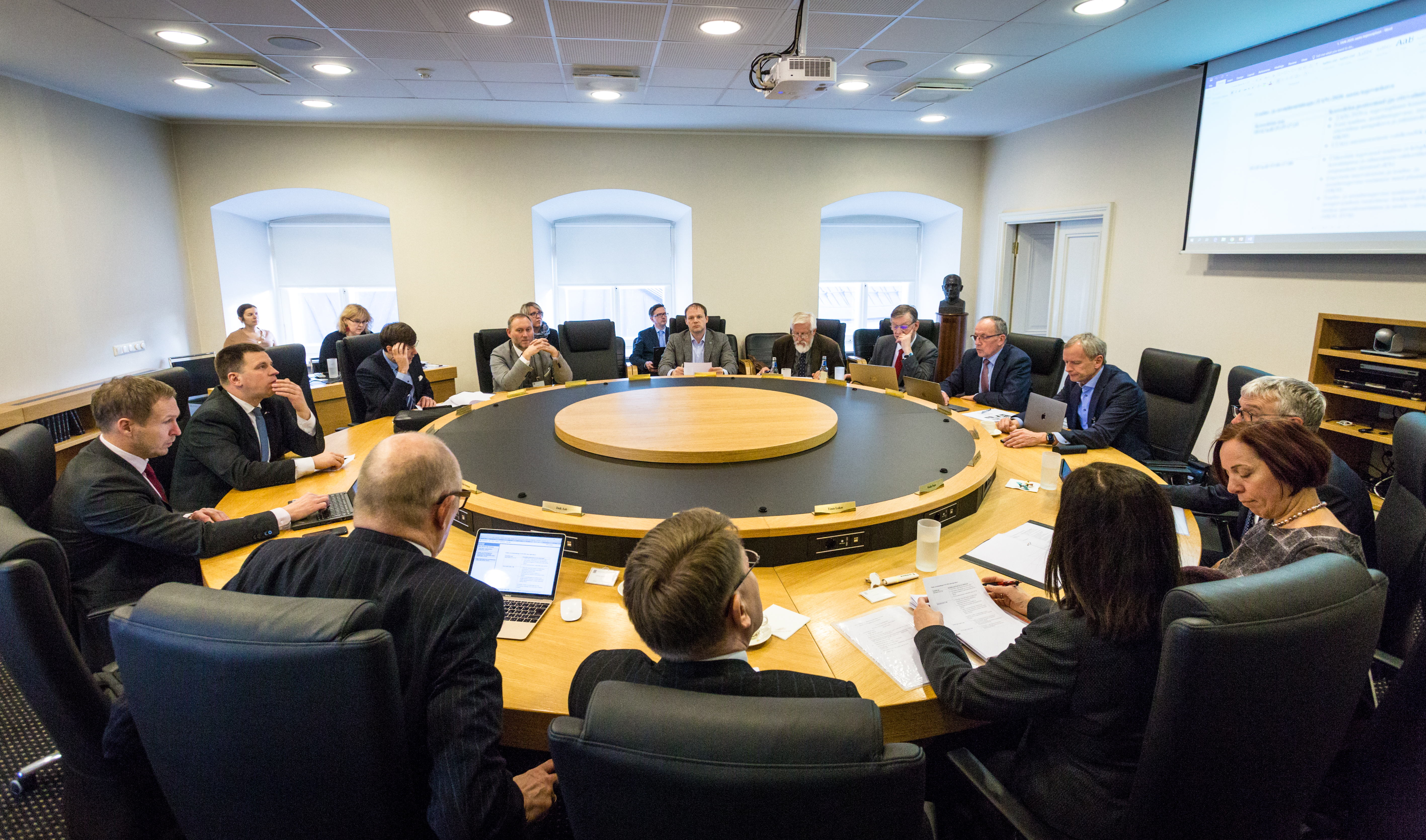 Teadus- ja Arendusnõukogu koosolek 5. veebruaril 2020